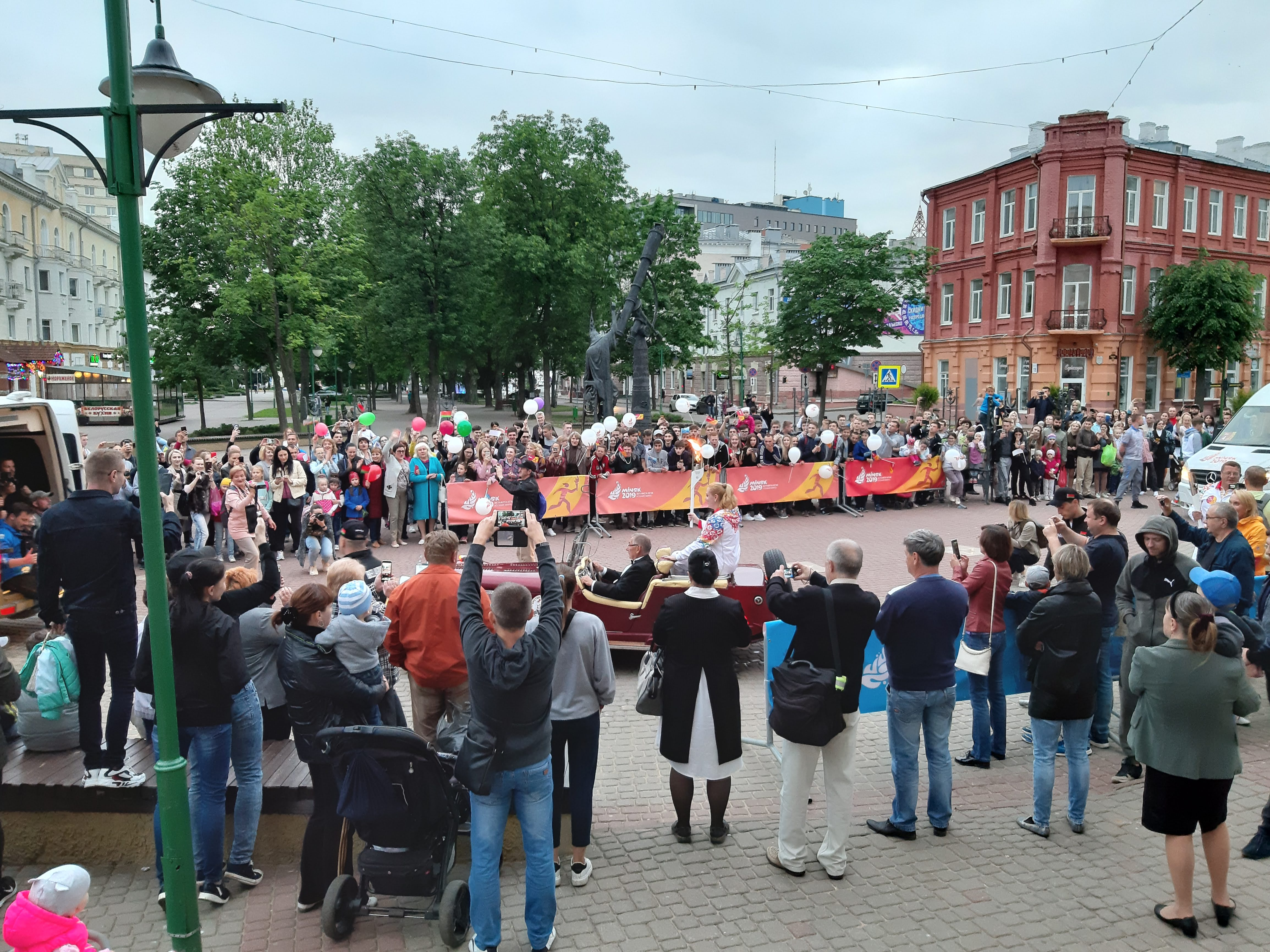 Магілёў. Эстафета агню Еўрапейскіх гульняў 2019